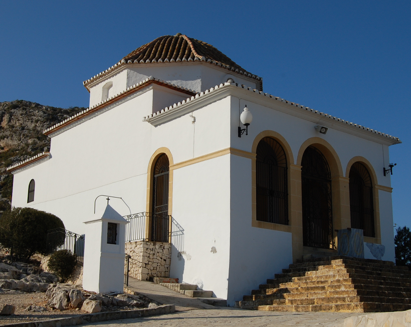 Capelleta de Sant Blai de Pedreguer (Marina Alta). Fou construïda durant la segona meitat del segle XVIII. Fou modificada el 1892, quan se li afegí el porxe. Ha estat restaurada diverses vegades: el 1926, el 1992 i, finalment, el 1998 després d'haver patit un incendi.